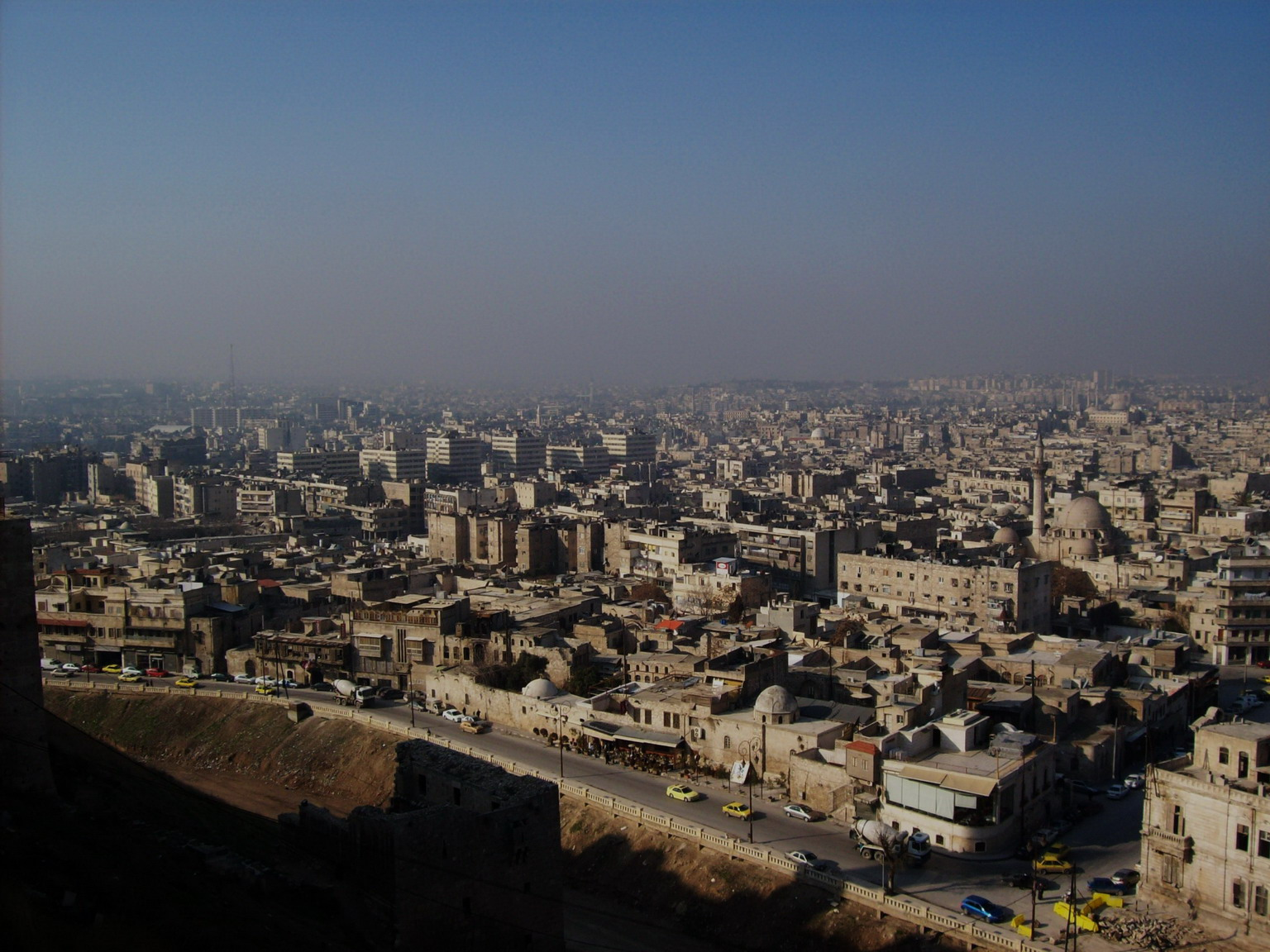 Aleppo